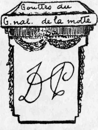 Société Histoire Pharmacie :Gouttes du Général La Motte